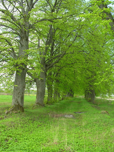 Obeliškiai, liepkelis į dvarvietę. Foto: Algirdas, 2006 m. ggeužės 17 d.